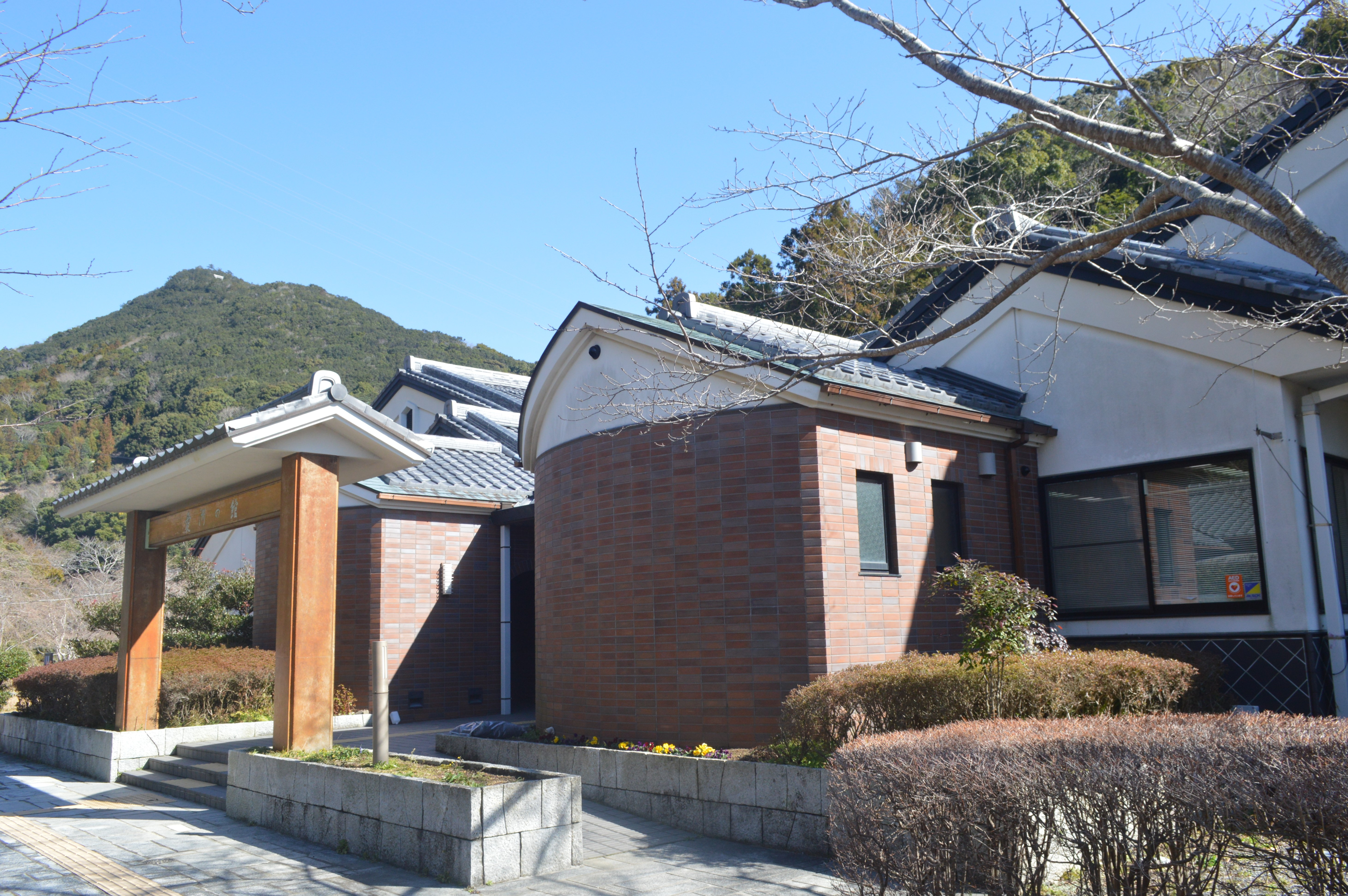 三重県度会郡南伊勢町五ヶ所浦にある愛洲の館。